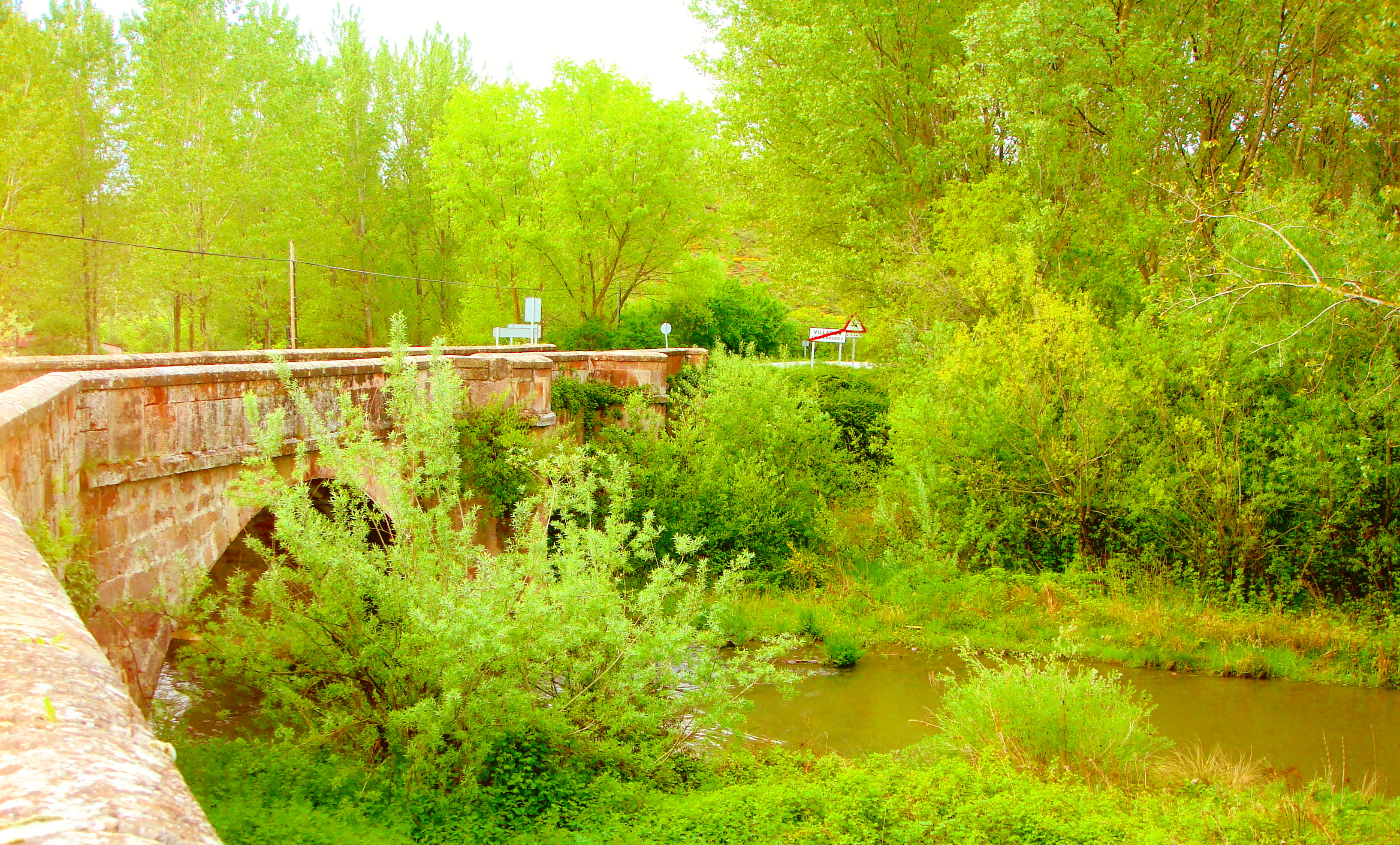 Puente sobre río Arlanzón, Villasur de Herreros, Burgos (España).